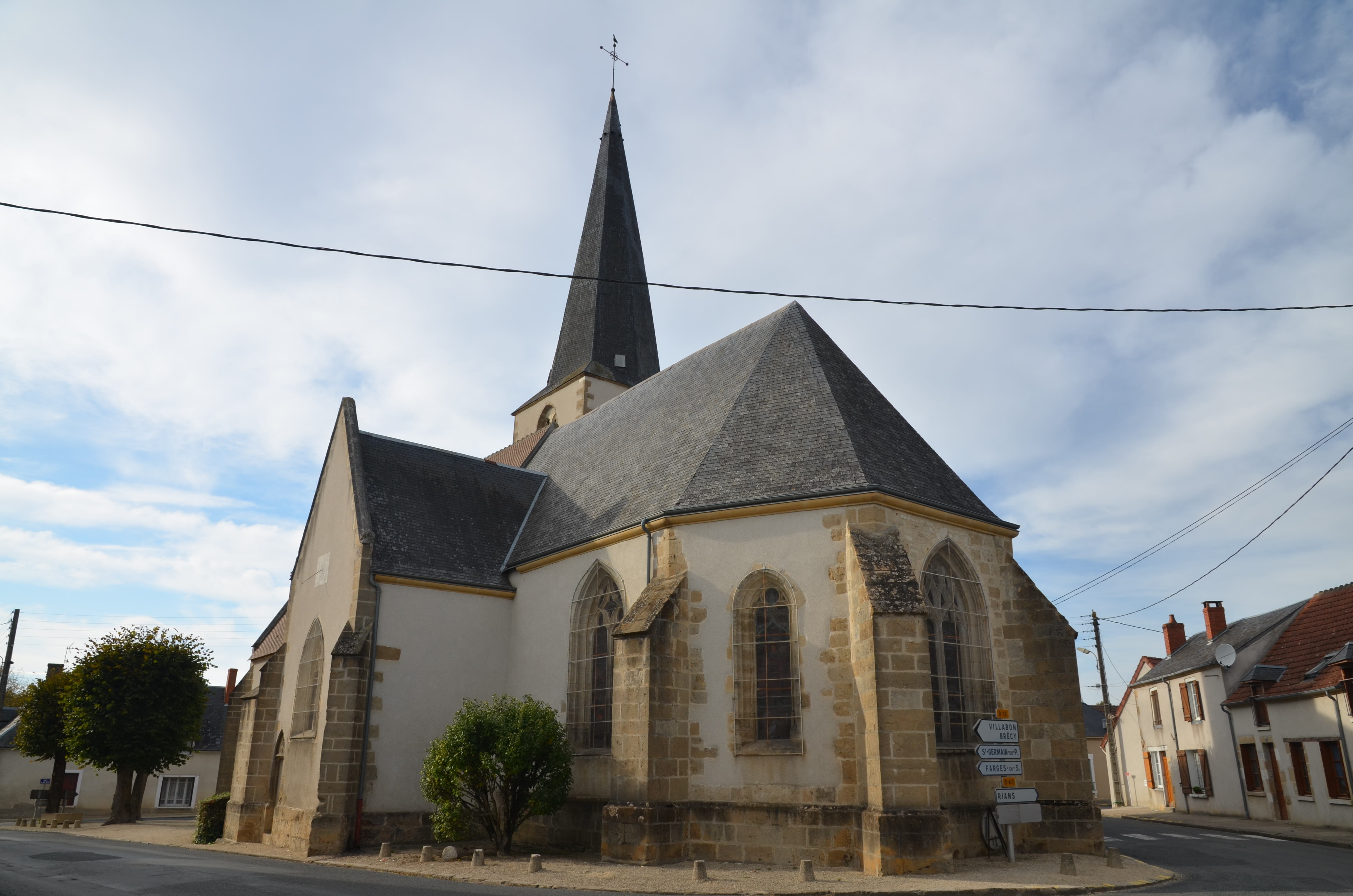 vue générale de l'édifice.